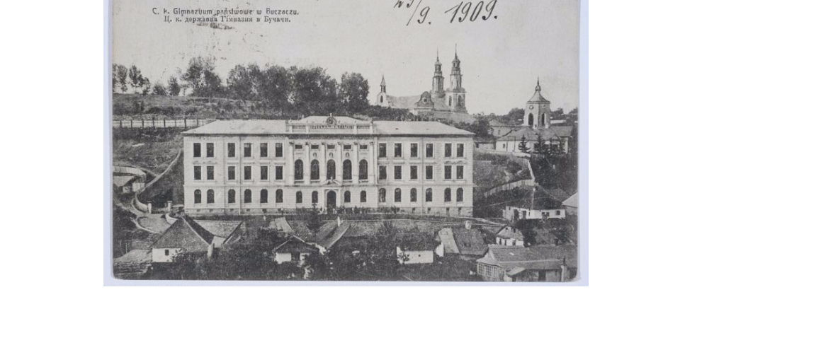 Бучач_гімназія_бл. 1909 C. k. gimnazyum państwowe w Buczaczu C. k. deržavna gimnaziâ v Bučači.